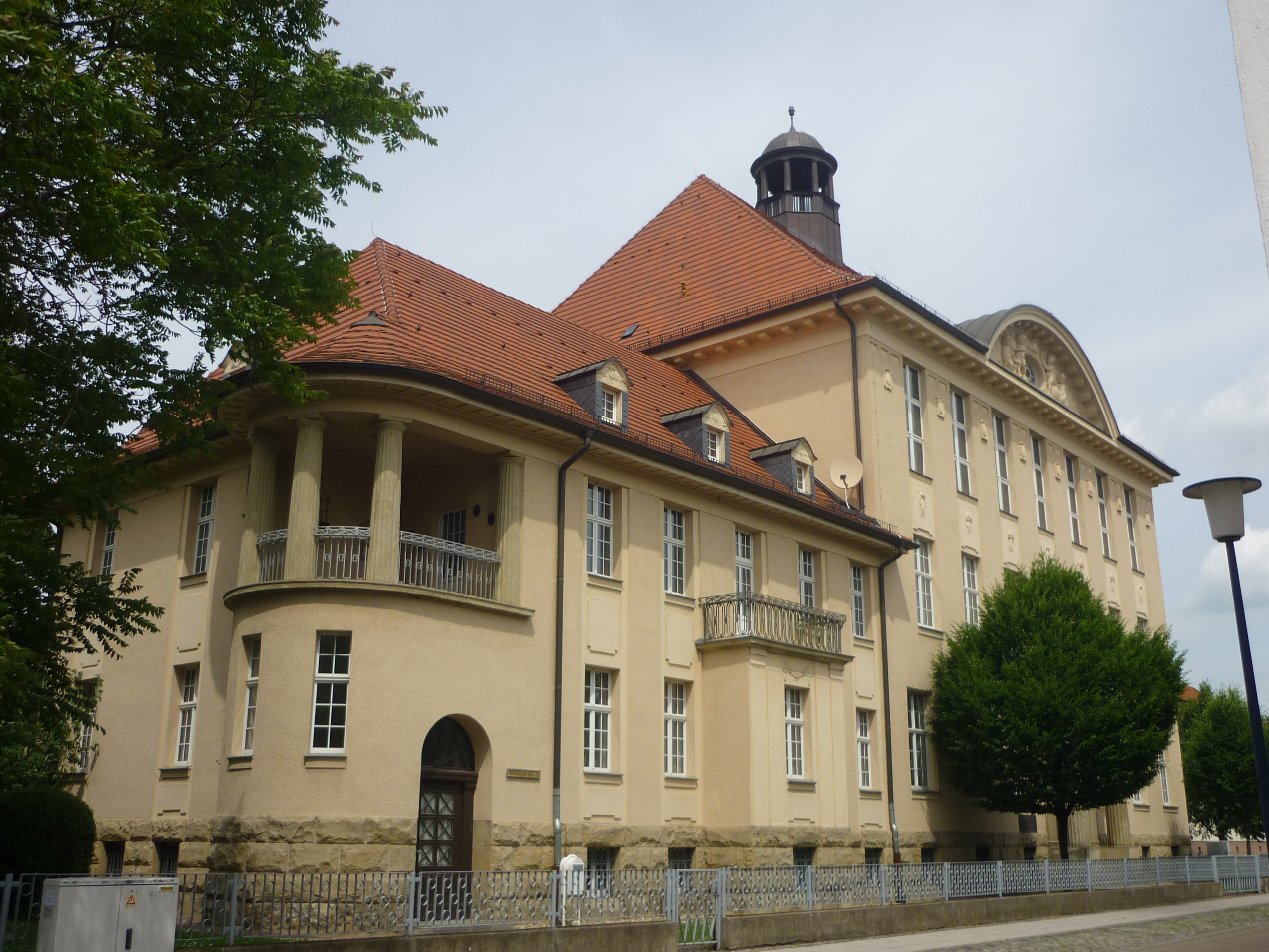 DFGH1